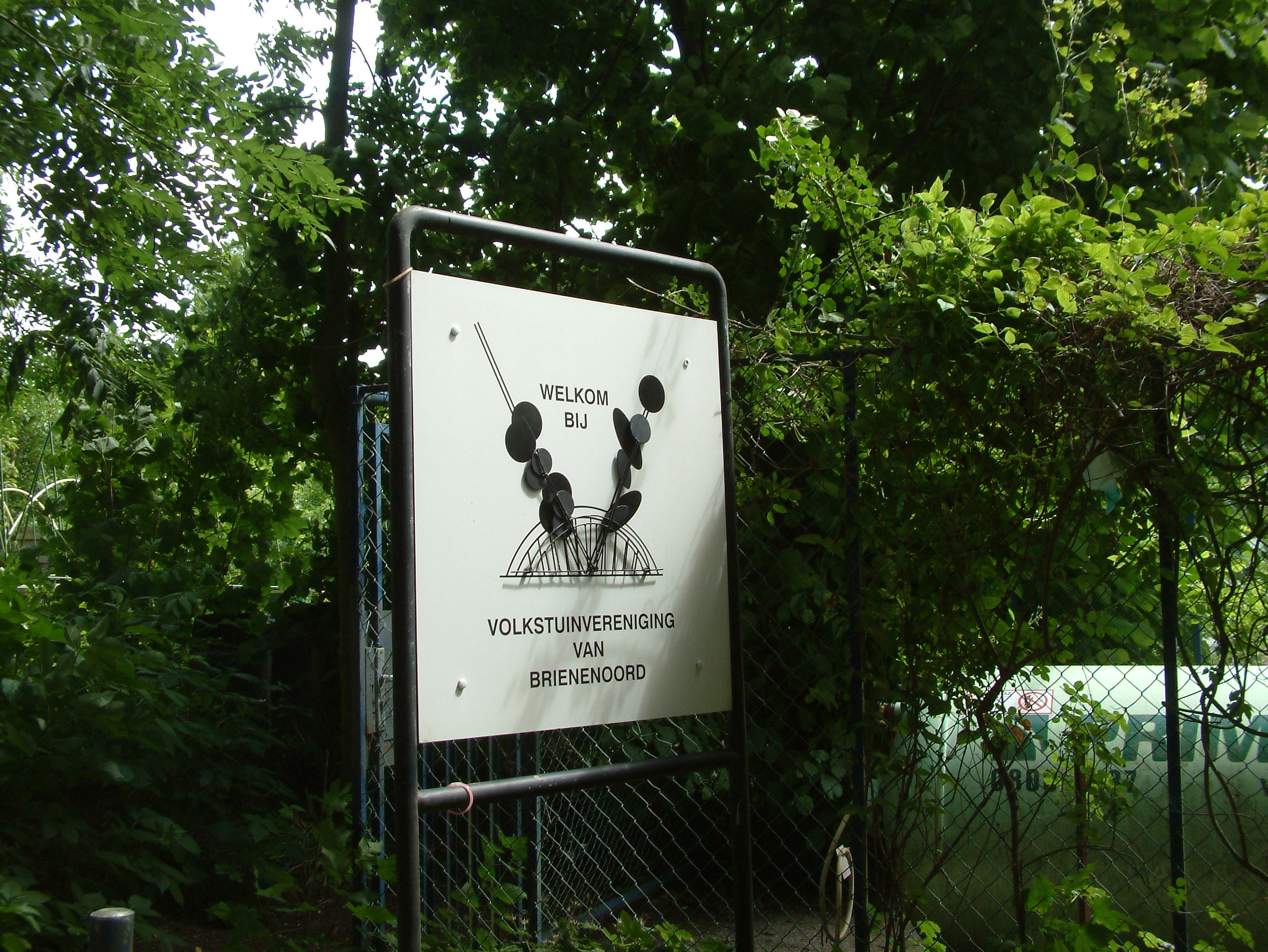 Volkstuinvereniging Van Brienenoord in IJsselmonde.